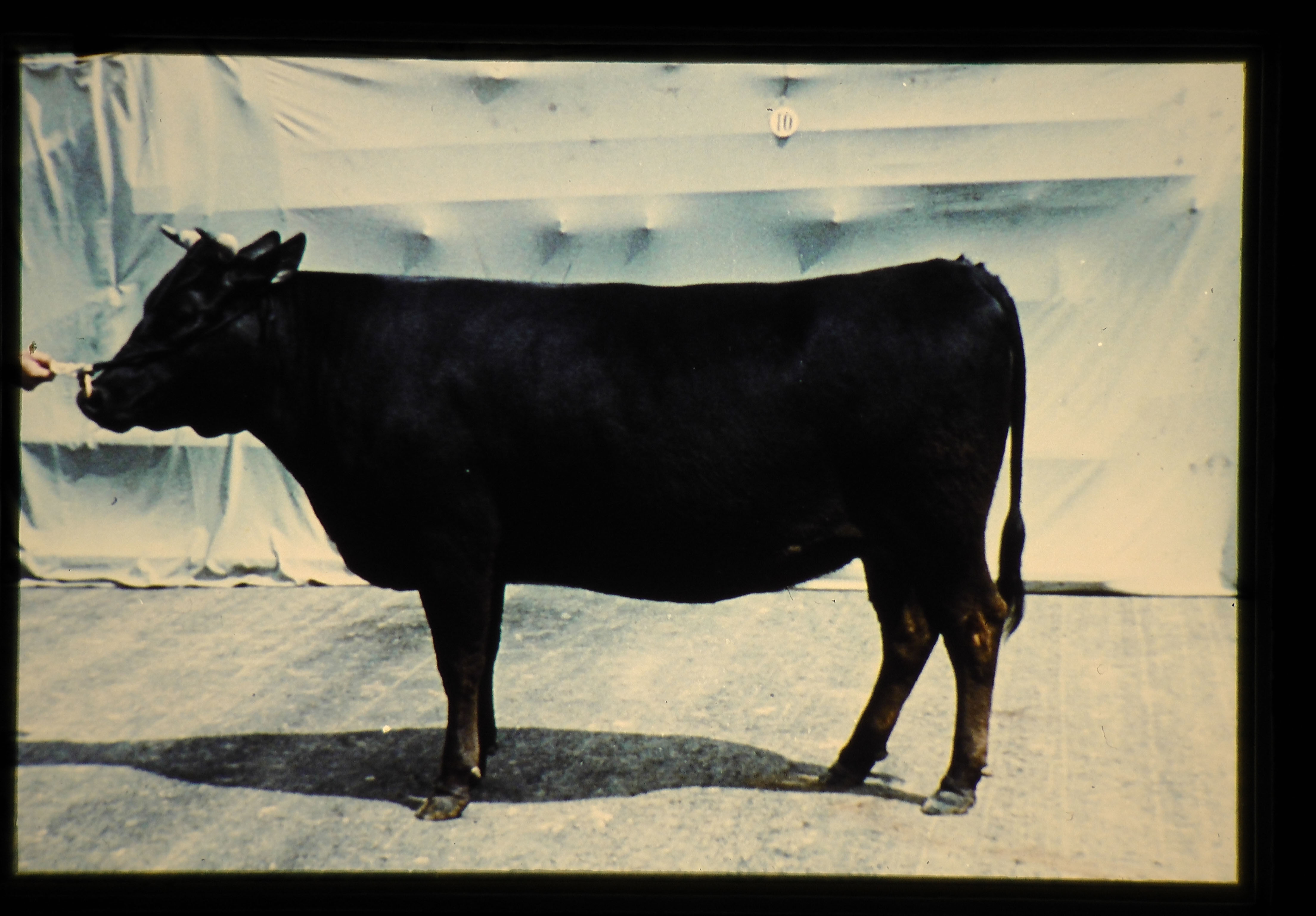 JIRCAS Photo Archive Author: 全国和牛登録協会 Description: 毛色は黒褐単色で、体下部、肢内側は淡色。角は側上内方へのび、角根は白く角尖は黒い。鼻鏡、蹄は黒灰色。肩峰はない。小型でやや大きく、体重は♀400kg、体高は♀124cm。肉役体型比率は6.5:3.5。後躯は肉付きが不十分であるが、体積があり斜尻も少ない。 Country: 日本 (Japan) Keywords: 日本,全国,畜産 Slide no. 01-064-02 本コンテンツは、政府標準利用規約第2.0版(クリエイティブ・コモンズ 表示 4.0 国際 ライセンス（CC BY）互換)に基づき、出典を明記の上で利用できます。利用条件の内容については「 JIRCAS Webサイトの利用について 」をご参照ください。 印刷物、調査研究等でご利用頂いた場合は、 お問い合わせフォーム にてお知らせ頂ければ幸いです（任意） This content is provided under the terms and conditions of the JIRCAS Website Terms of Use or Creative Commons Attribution 4.0 International (CC BY 4.0) license.